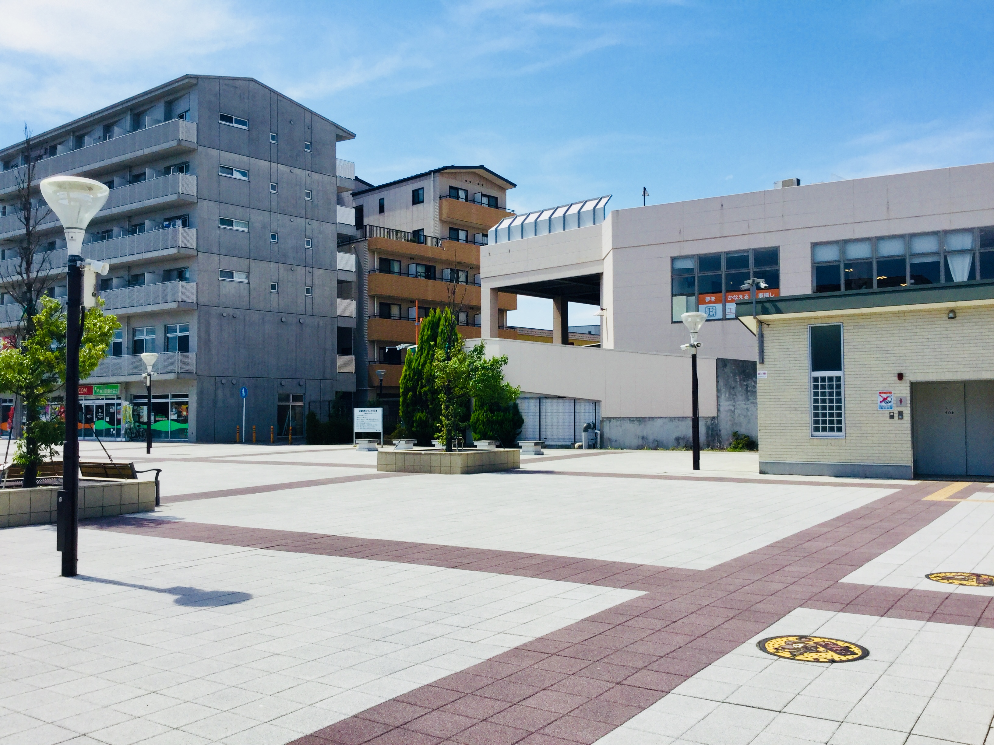 寒川駅前公園